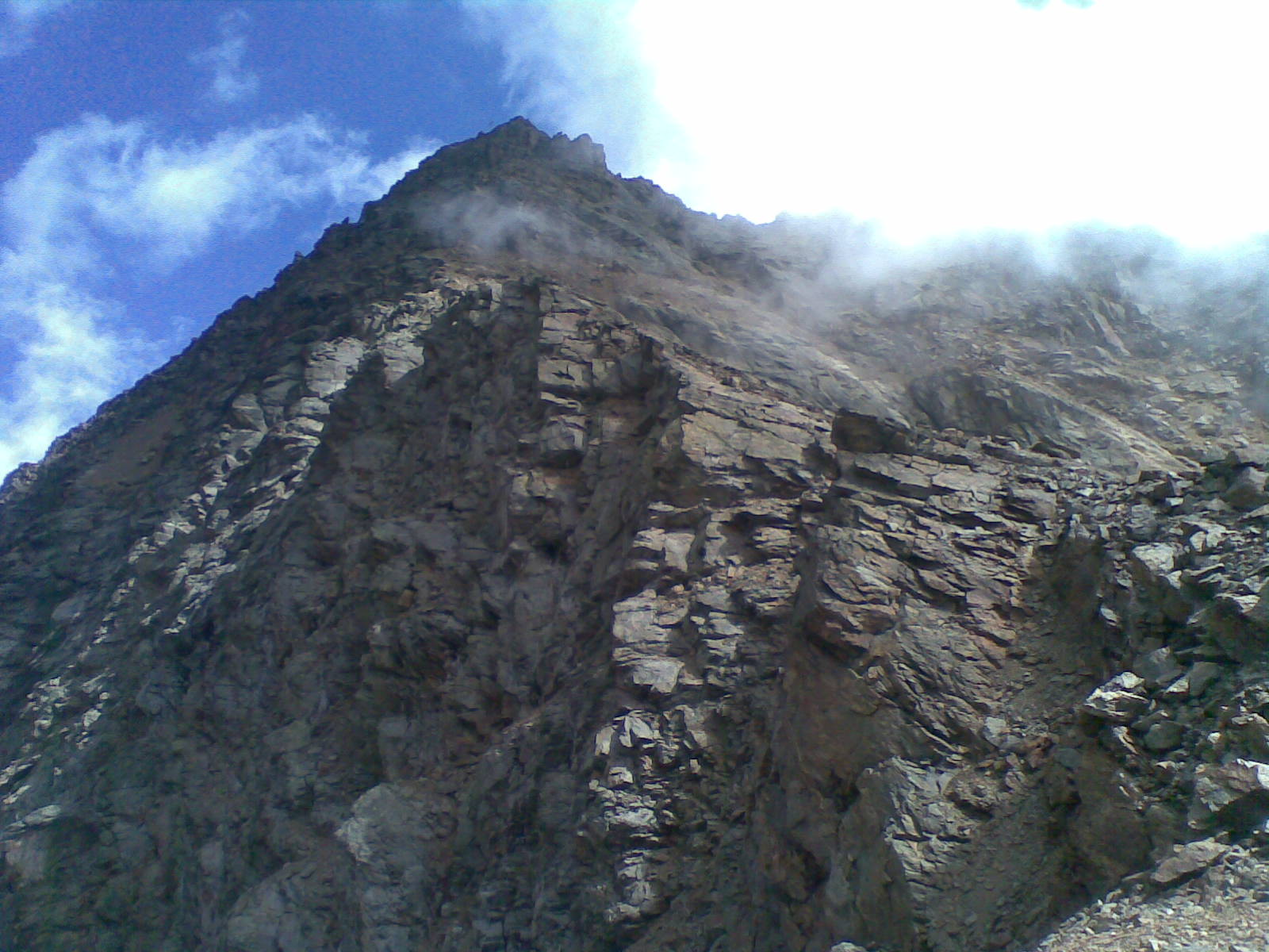 Cima Sternai vista da pochi metri di distanza, da quota 3250 m circa.